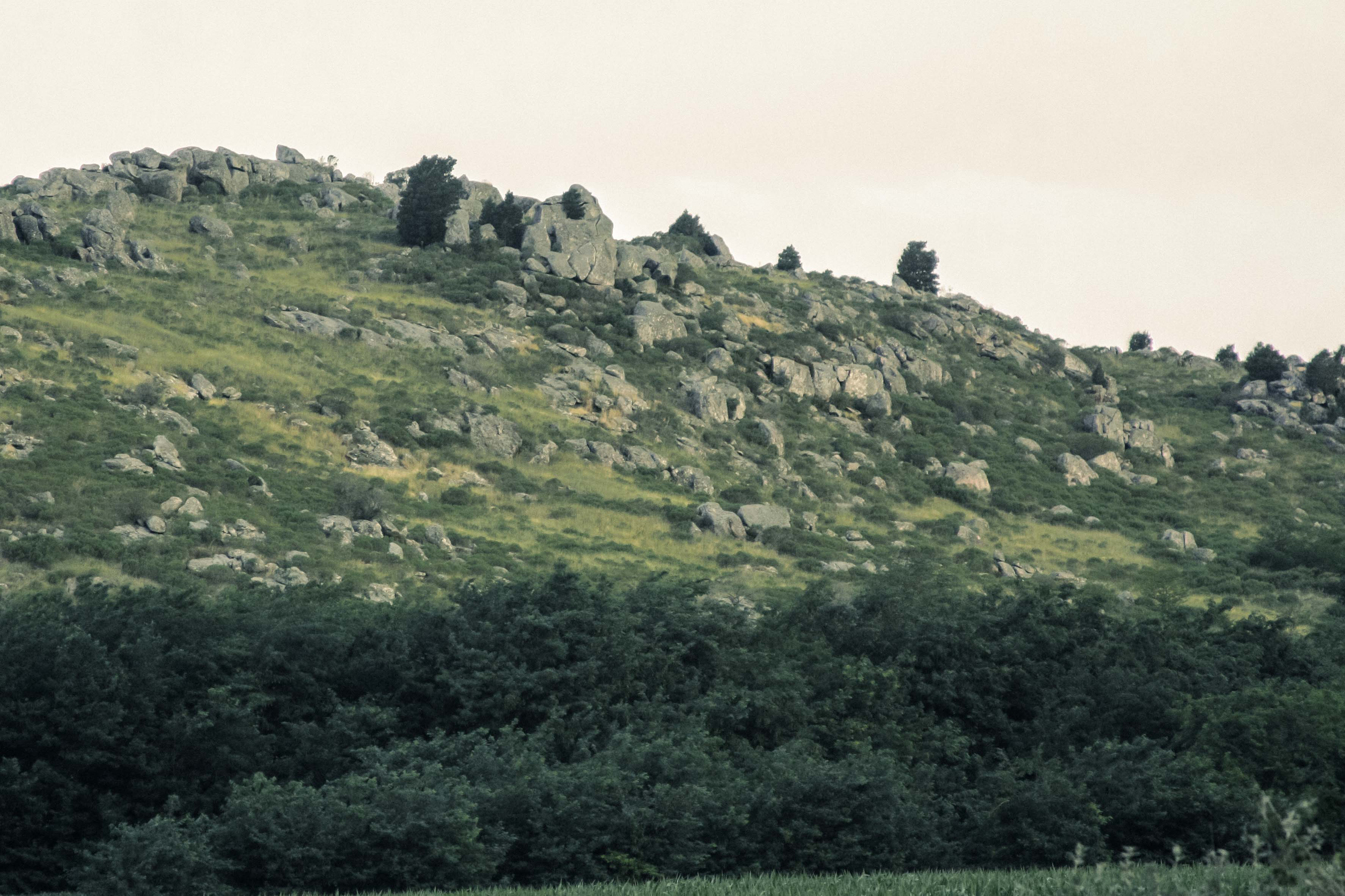 Imágen de parte de la boca de las sierras, ubicada en la ruta provincial nro. 80, tomada al atardecer el último día del año 2016